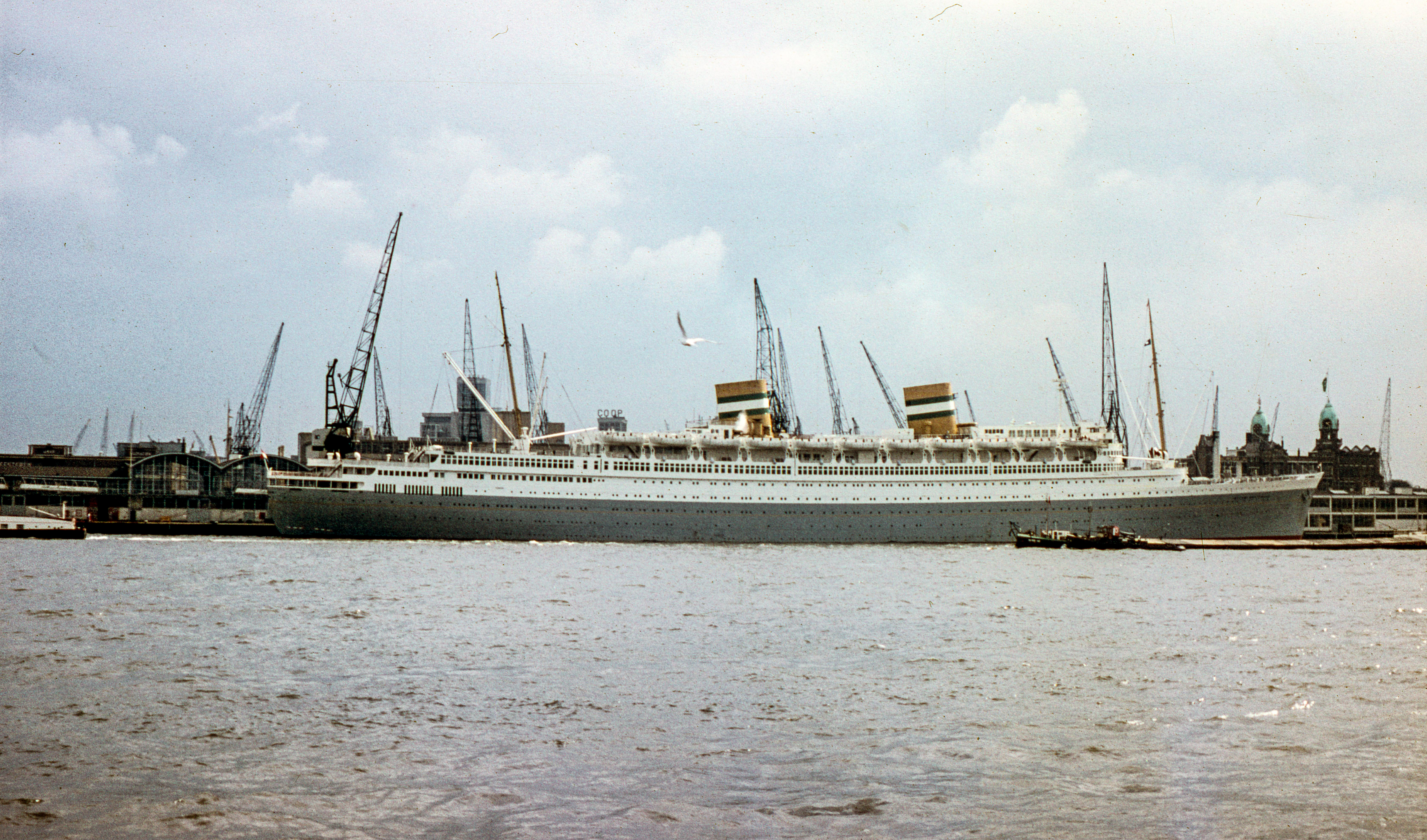 szemben a Holland Amerikakaade, jobbra a Hotel New York tornyai. Location: Netherlands, Rotterdam Tags: crane, colorful, ship Title: szemben a Holland Amerikakaade, jobbra a Hotel New York tornyai.